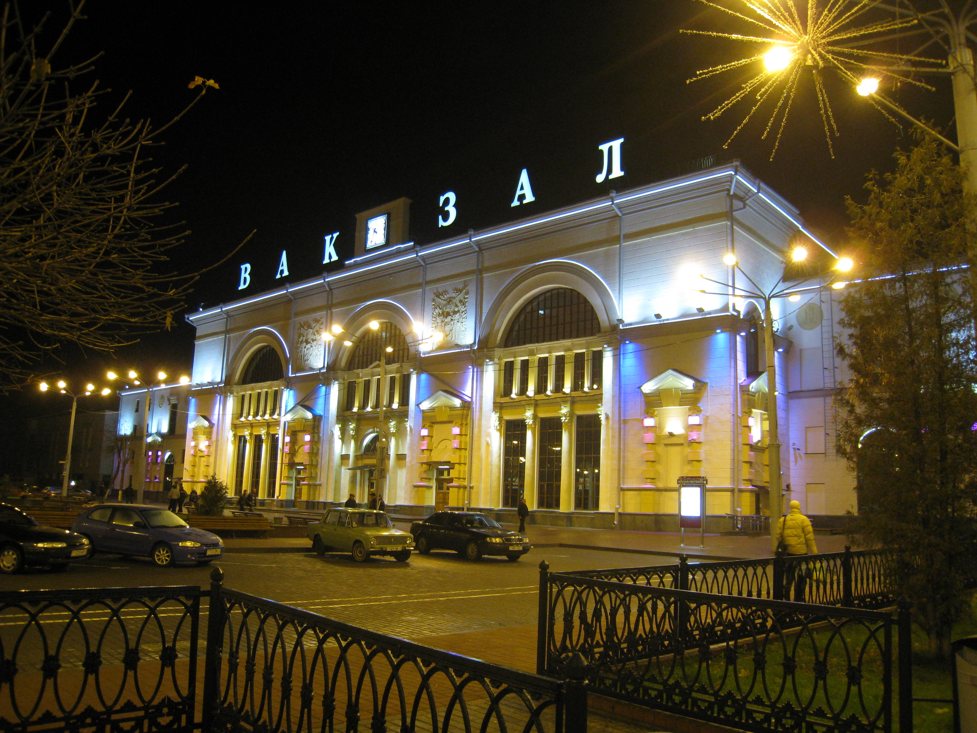 Беларуская (тарашкевіца): Вакзал у Віцебску пасьля рэканструкцыі.